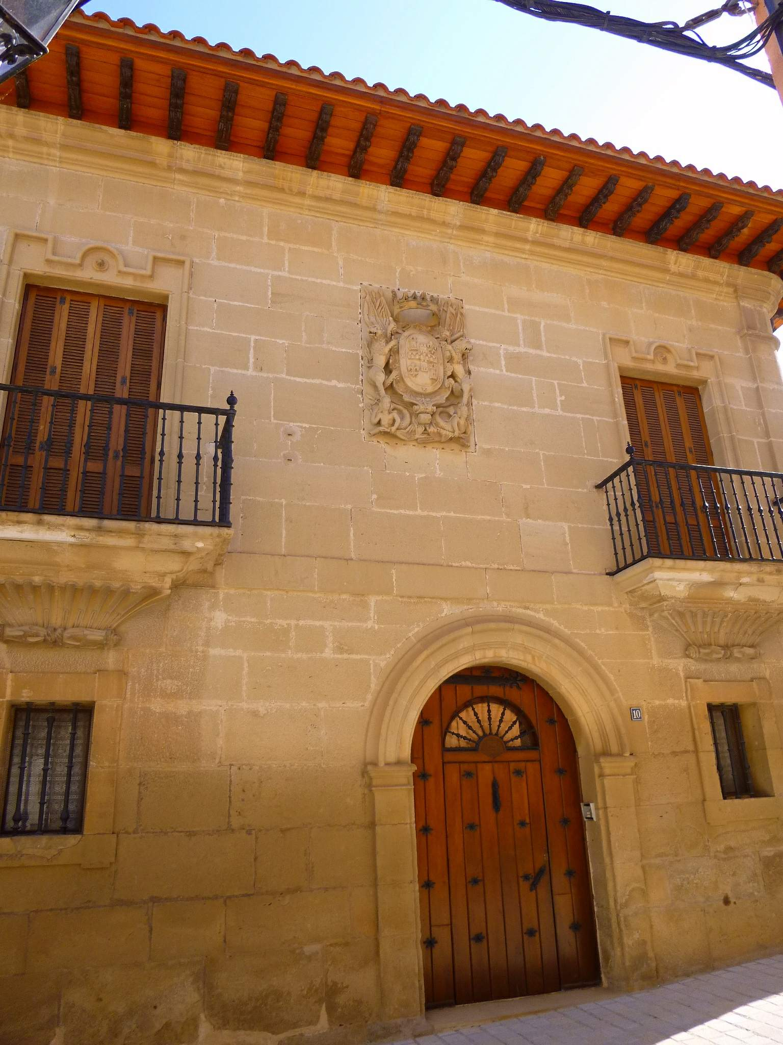 Palacio de los Condes de Bureta (Oyón, Álava)